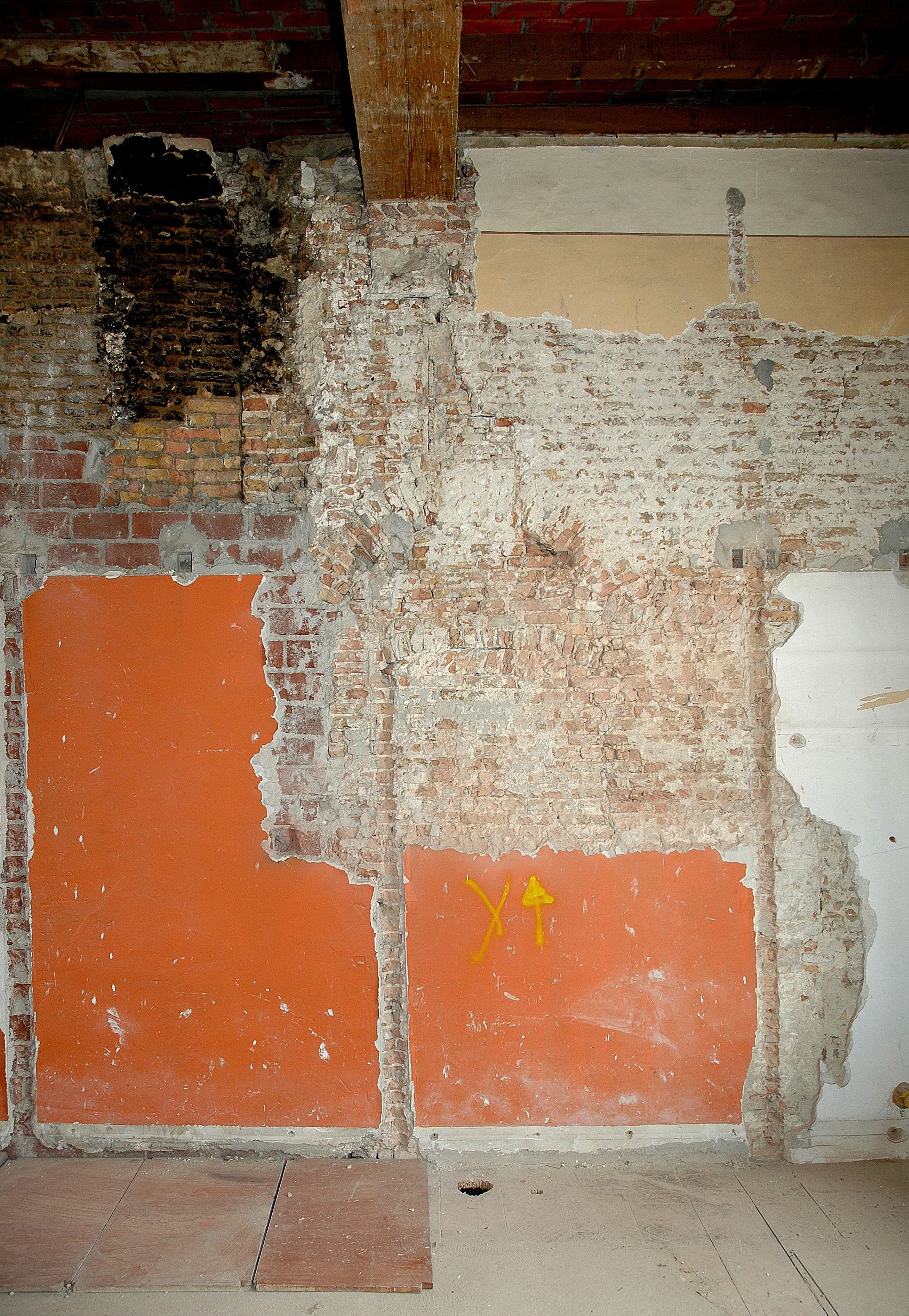 De bouwhistorisch onderzoeker heeft geduld en kennis nodig.